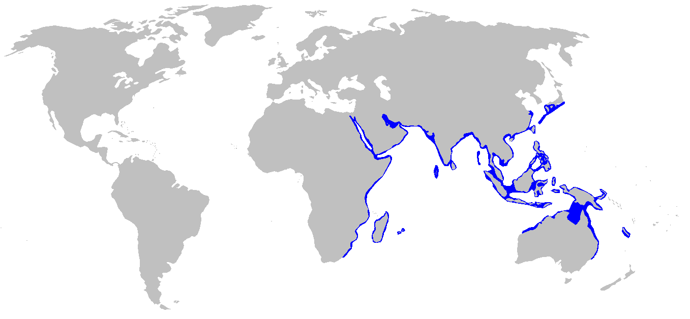 Distribution map for Stegostoma fasciatum